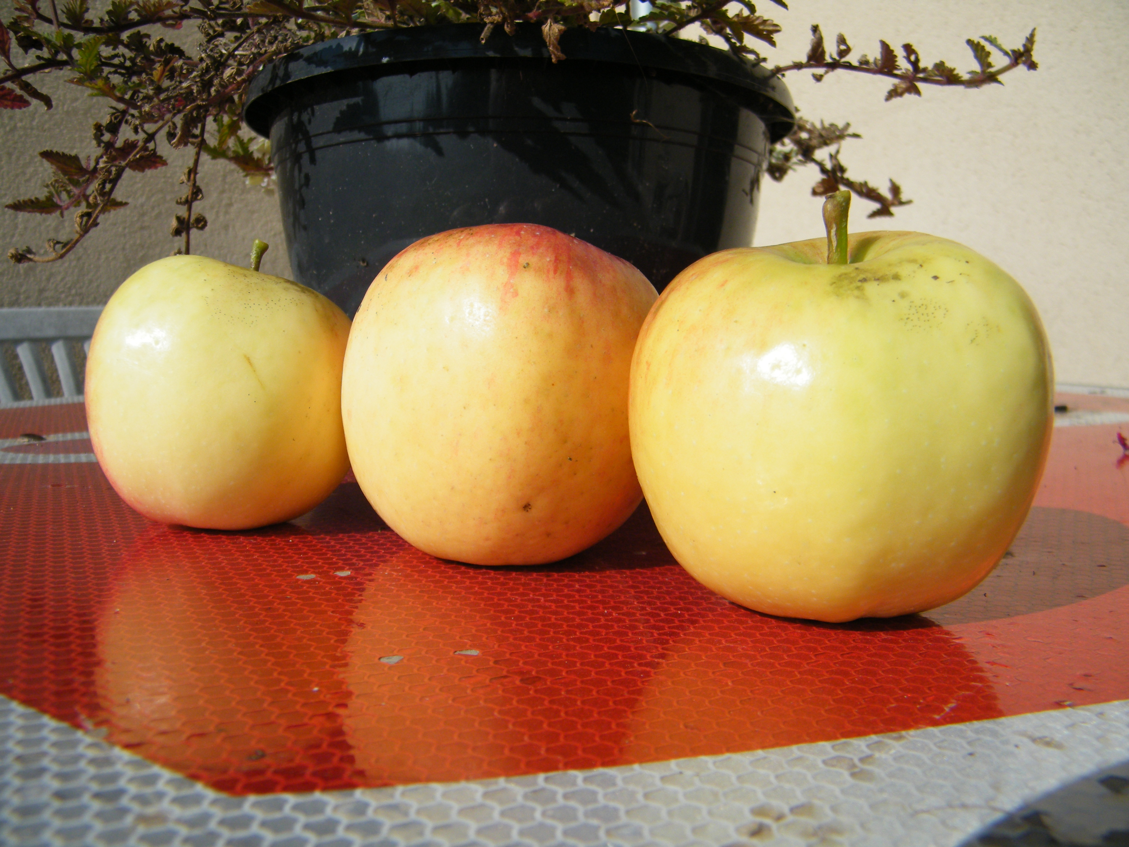 Florina (Querina). La variété peut devenir très jaune, à l'ombre, en se rapprochant de la maturité.